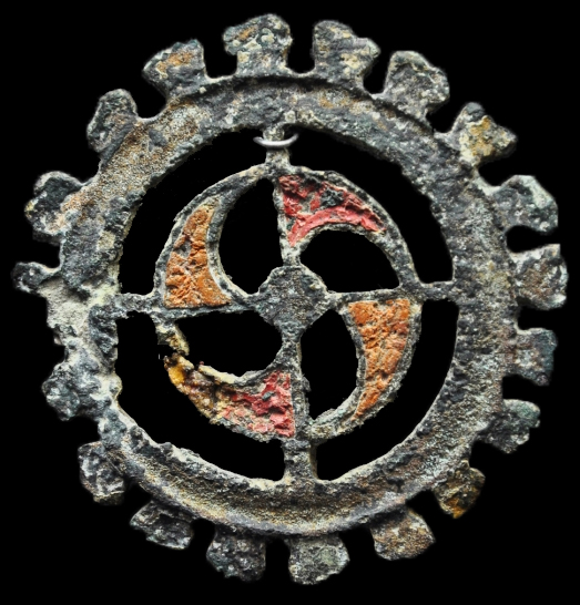 Фібула з выемкавай эмаллю чырвонага і аранжавага колераў. І-ІІІ стст. Бронза, эмаль. Лукомль. Раскопкі Г.В. Штыхава.